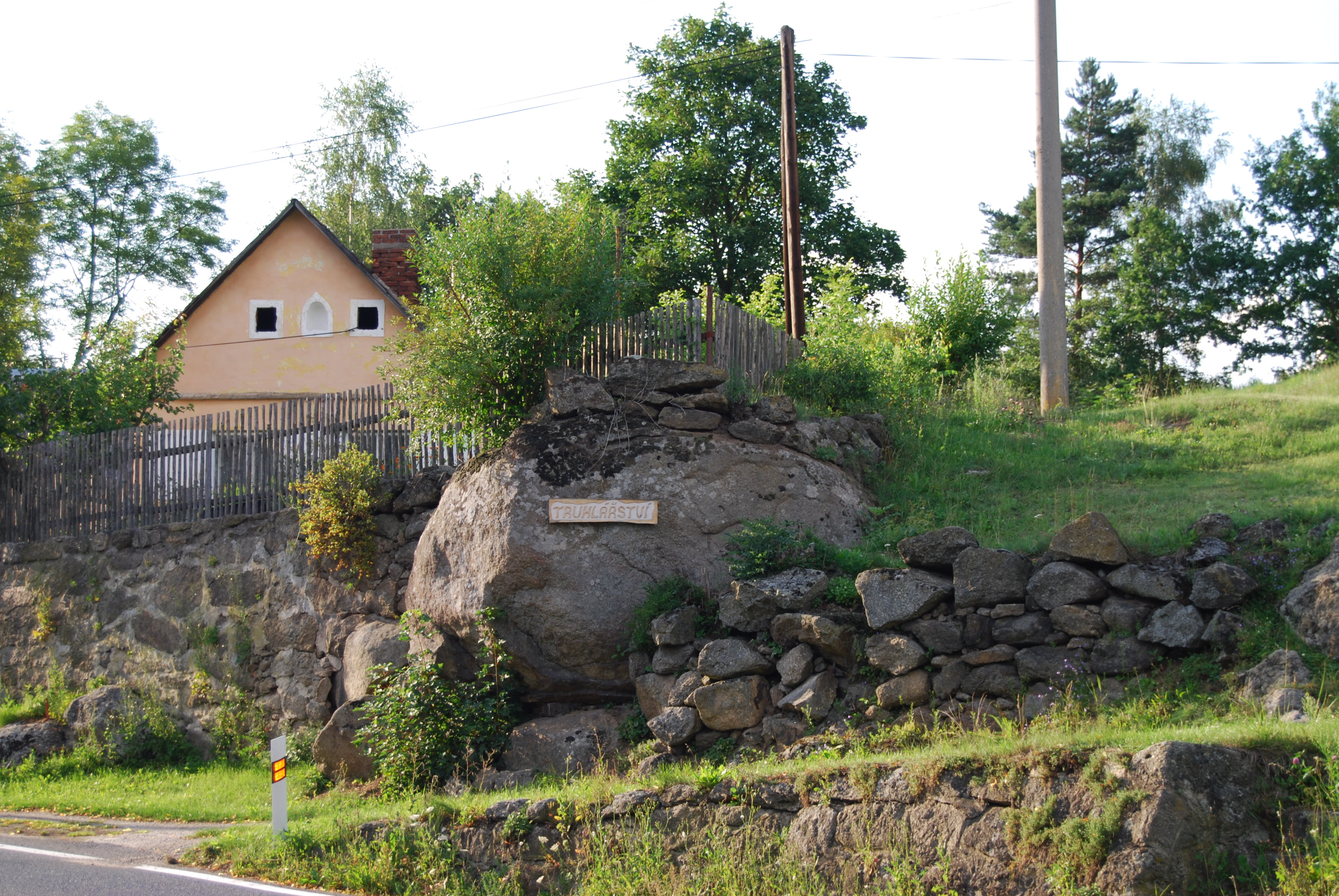 Stavení v obci. Vilasova Lhota je část obce Petrovice v okrese Příbram. Česká republika.